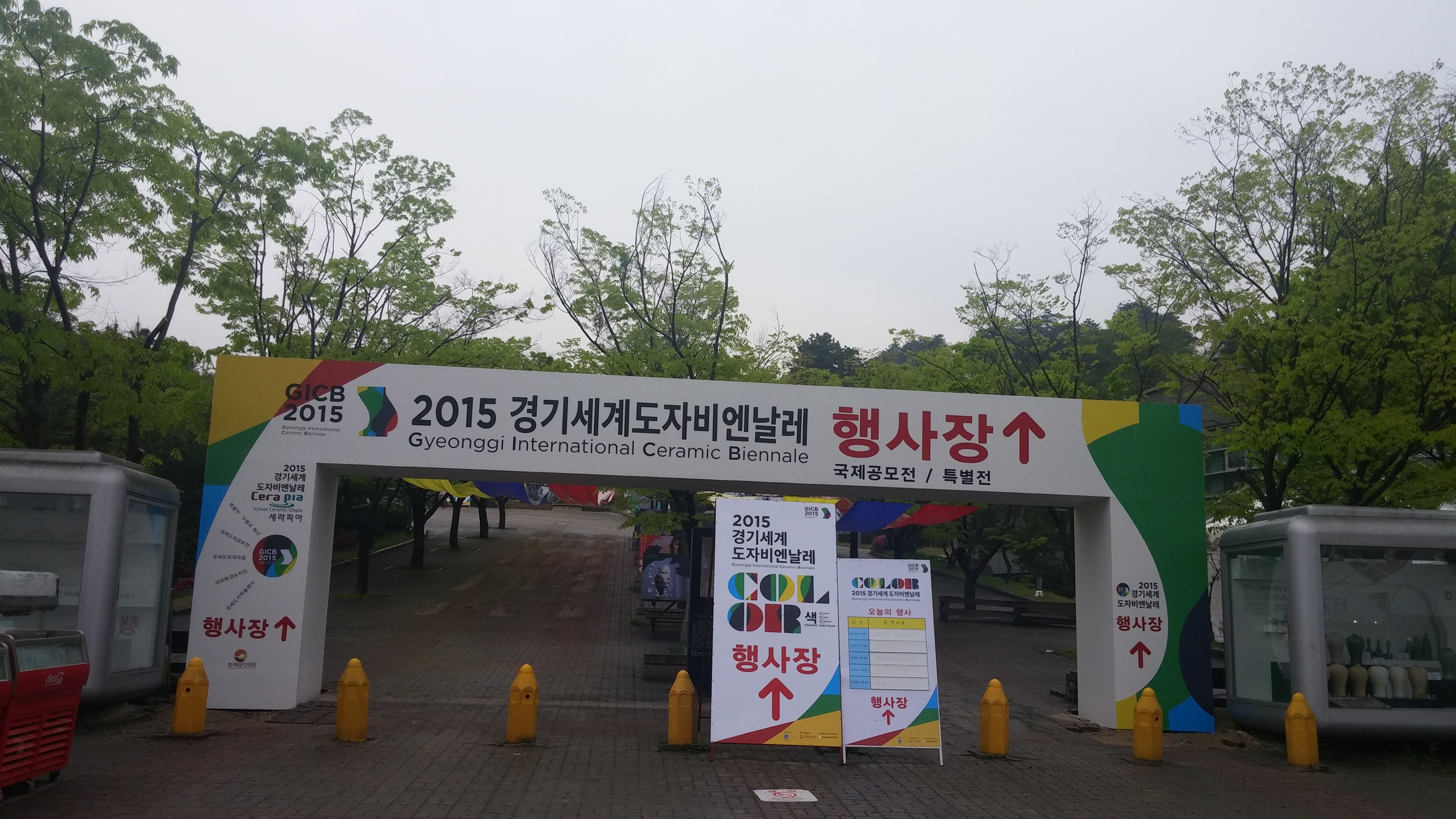 이천 도자기 축제 (7)